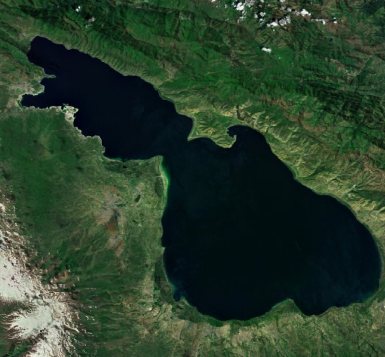 Lacul Sevan văzut din spaţiu. Imagine realizata cu date SRTM furnizate liber de NASA.